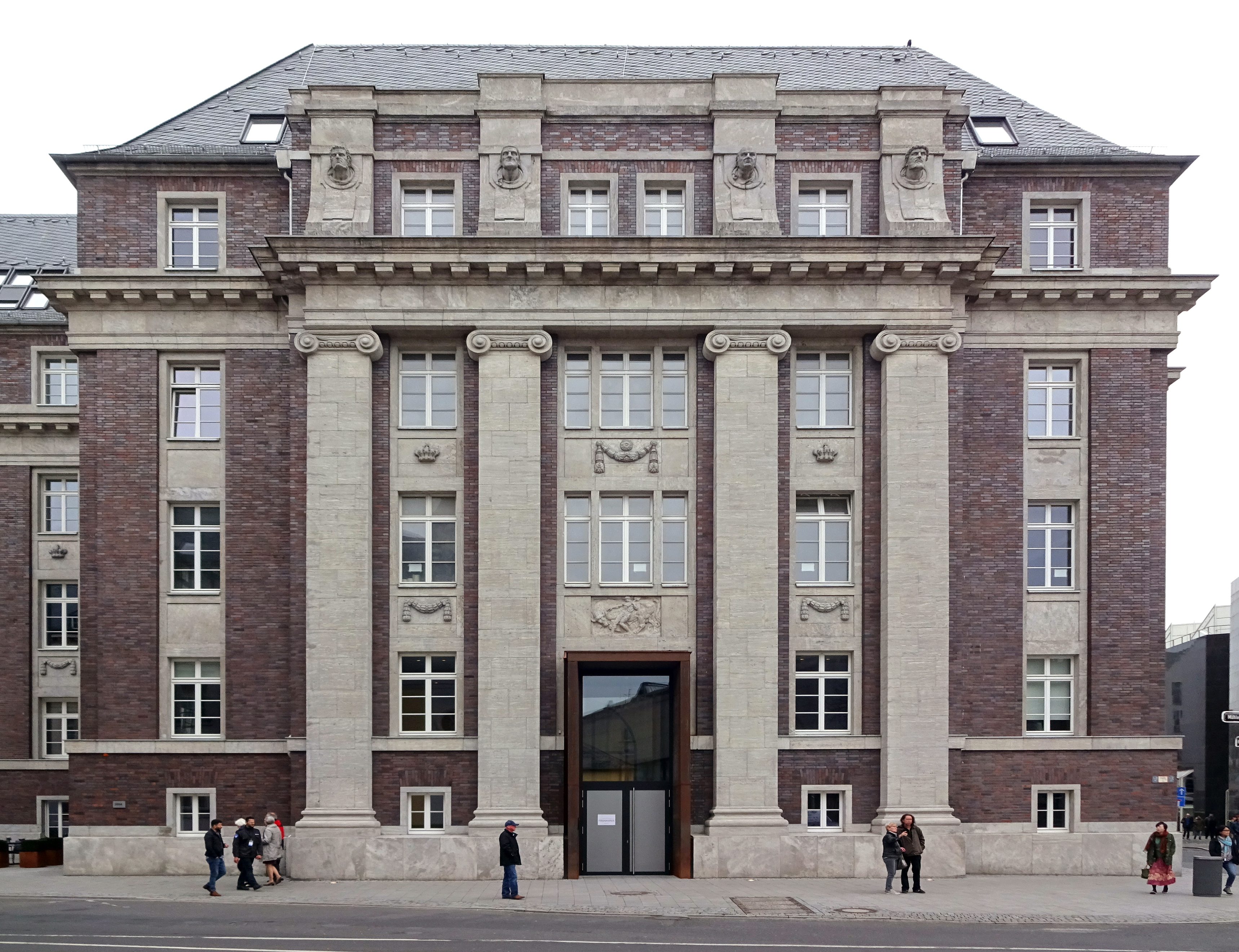 Ehemaliges Amtsgericht, Portal Mühlenstraße 36, Frankonia Eurobau Andreas Quartier, Düsseldorf-Altstadt. An den Attiken der Eckrisalite die Kopfmedaillons von Leopold Fleischhacker.